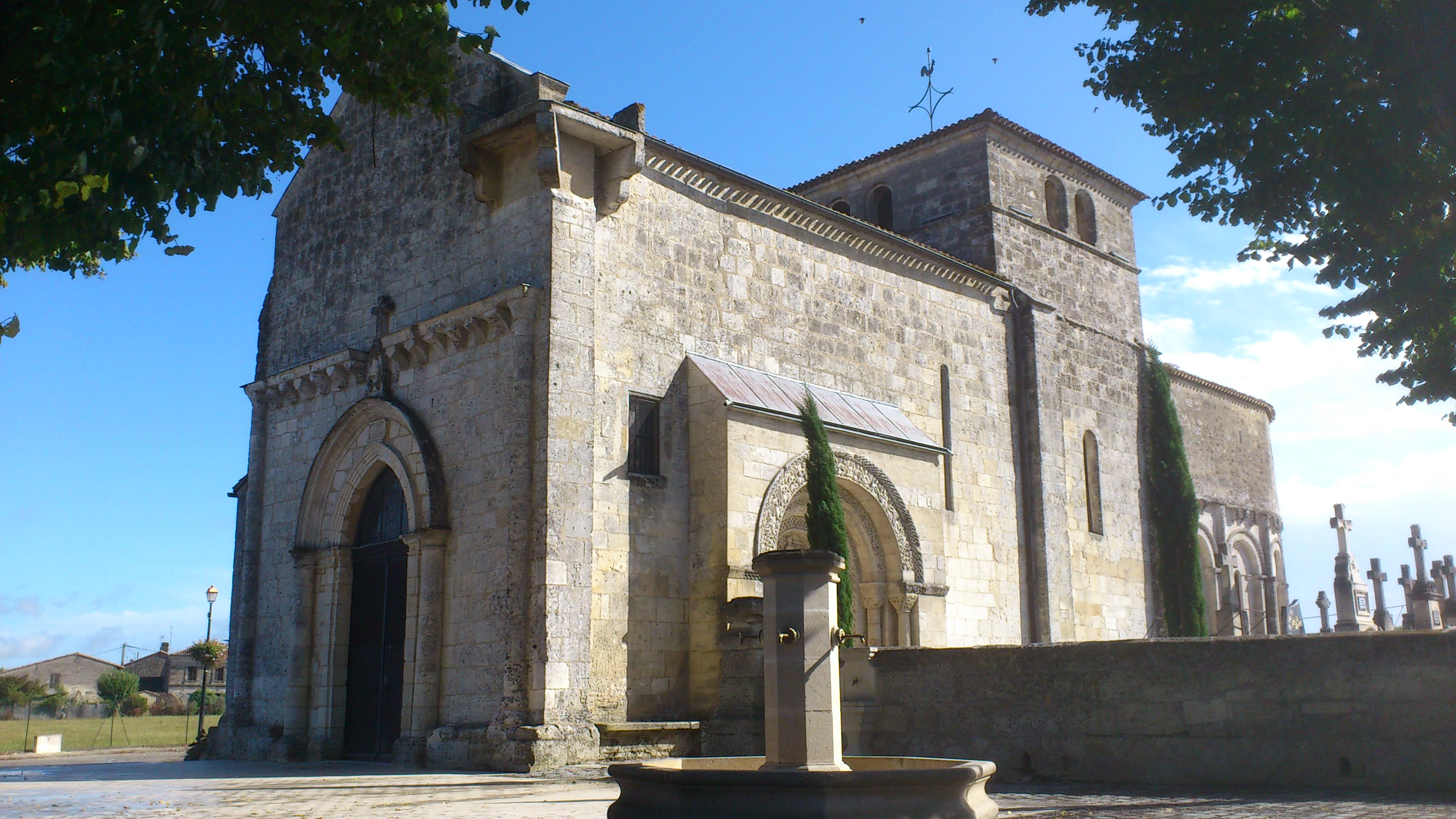 Église Saint-Pierre de Lande-de-Fronsac .